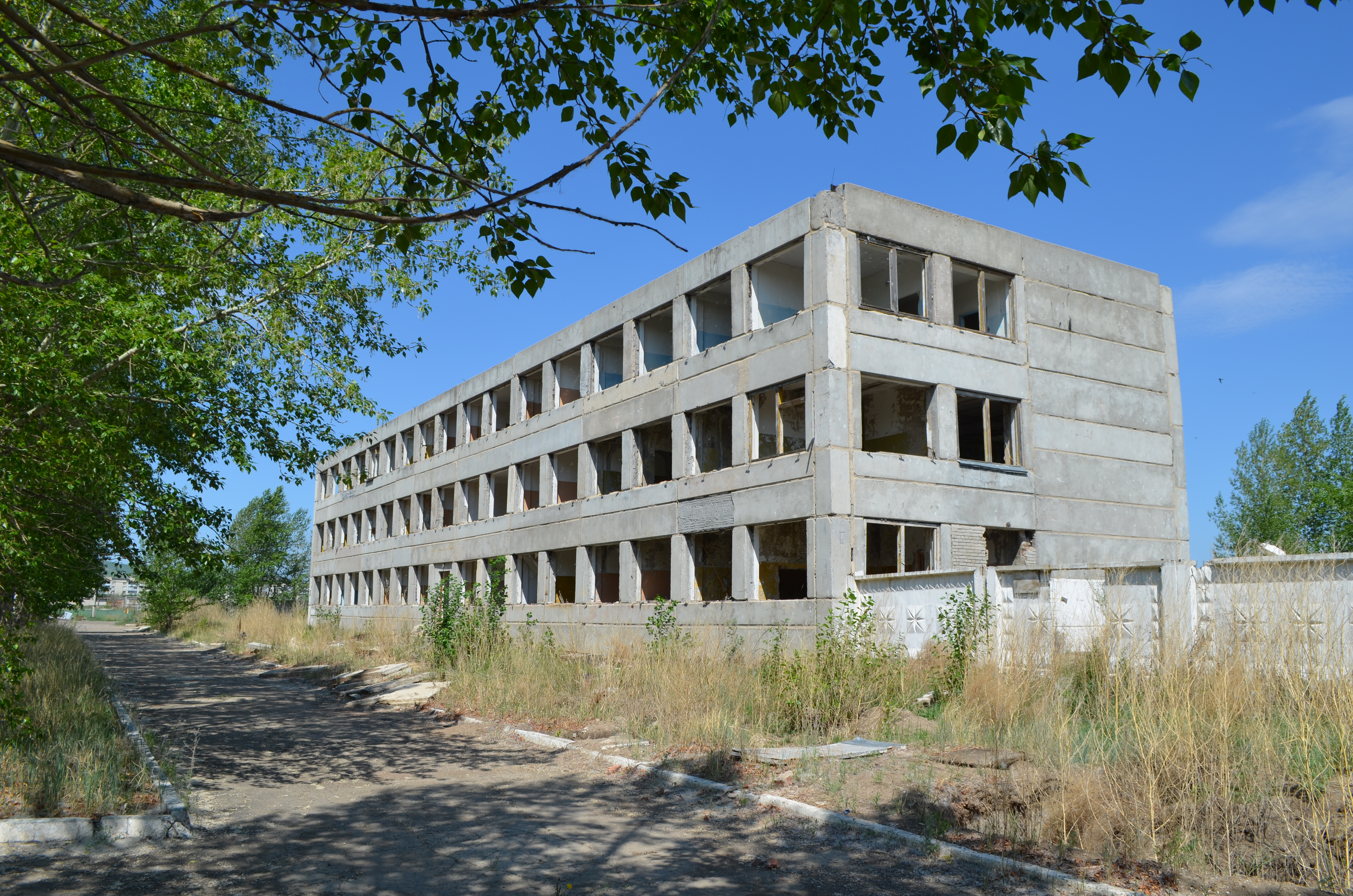 Развалины штаба в/ч 40942